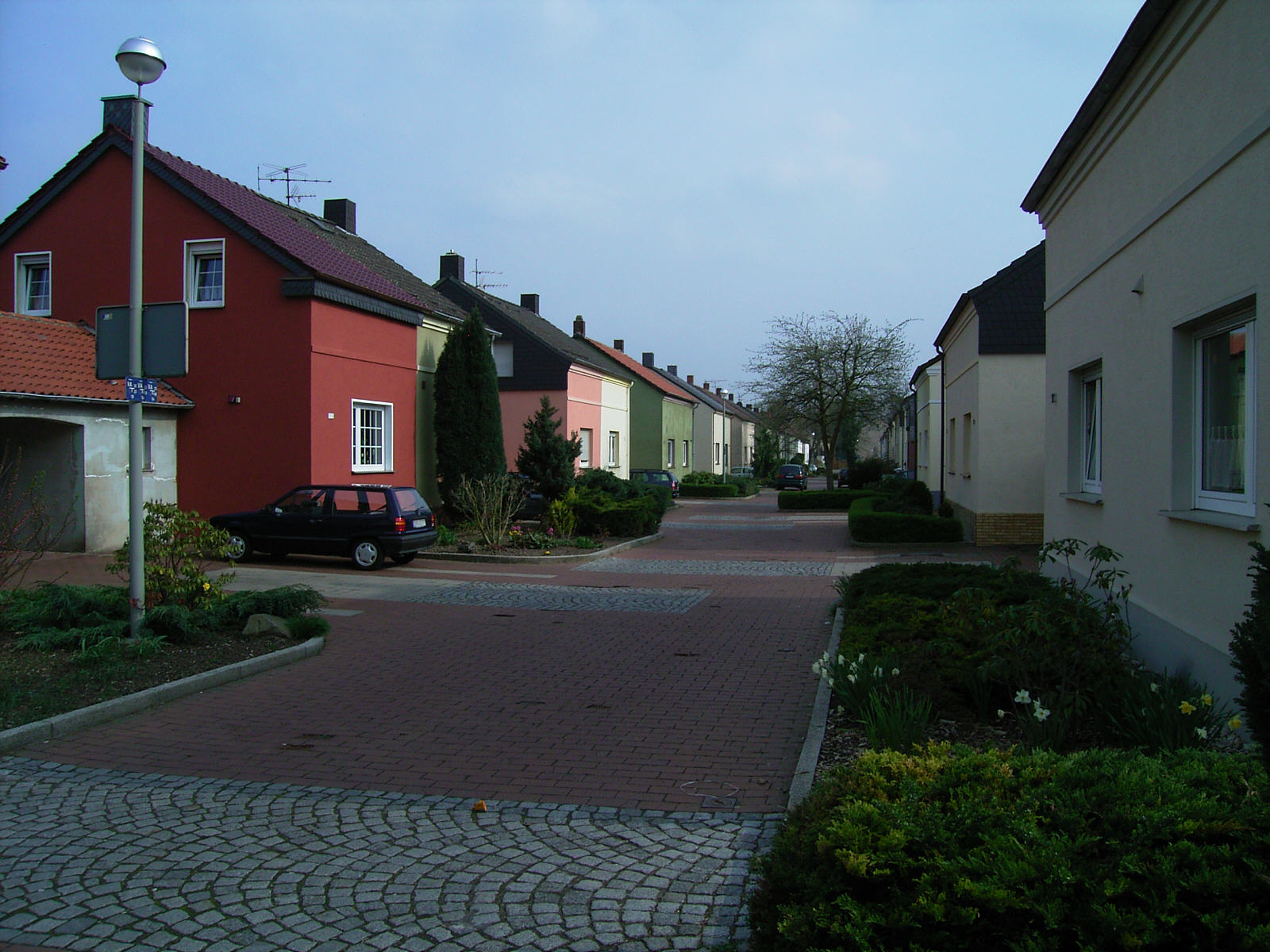 Sanierte Zechensiedlung in Königsborn (Unna) mit typischen Kniestock-Häusern